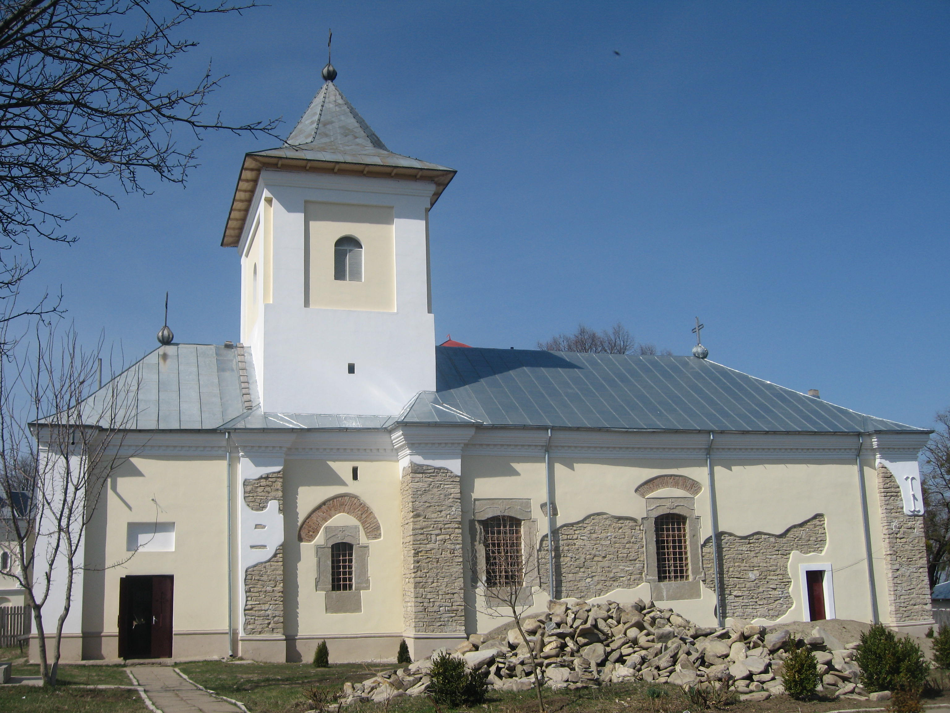 Biserica Sf. Voievozi din Popești, jud. Iași, România